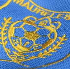 Símbolo Maureles FC